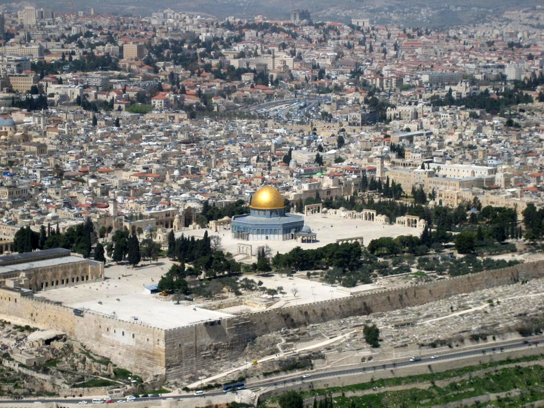 נוצר על ידי he:משתמש:אסף.צ